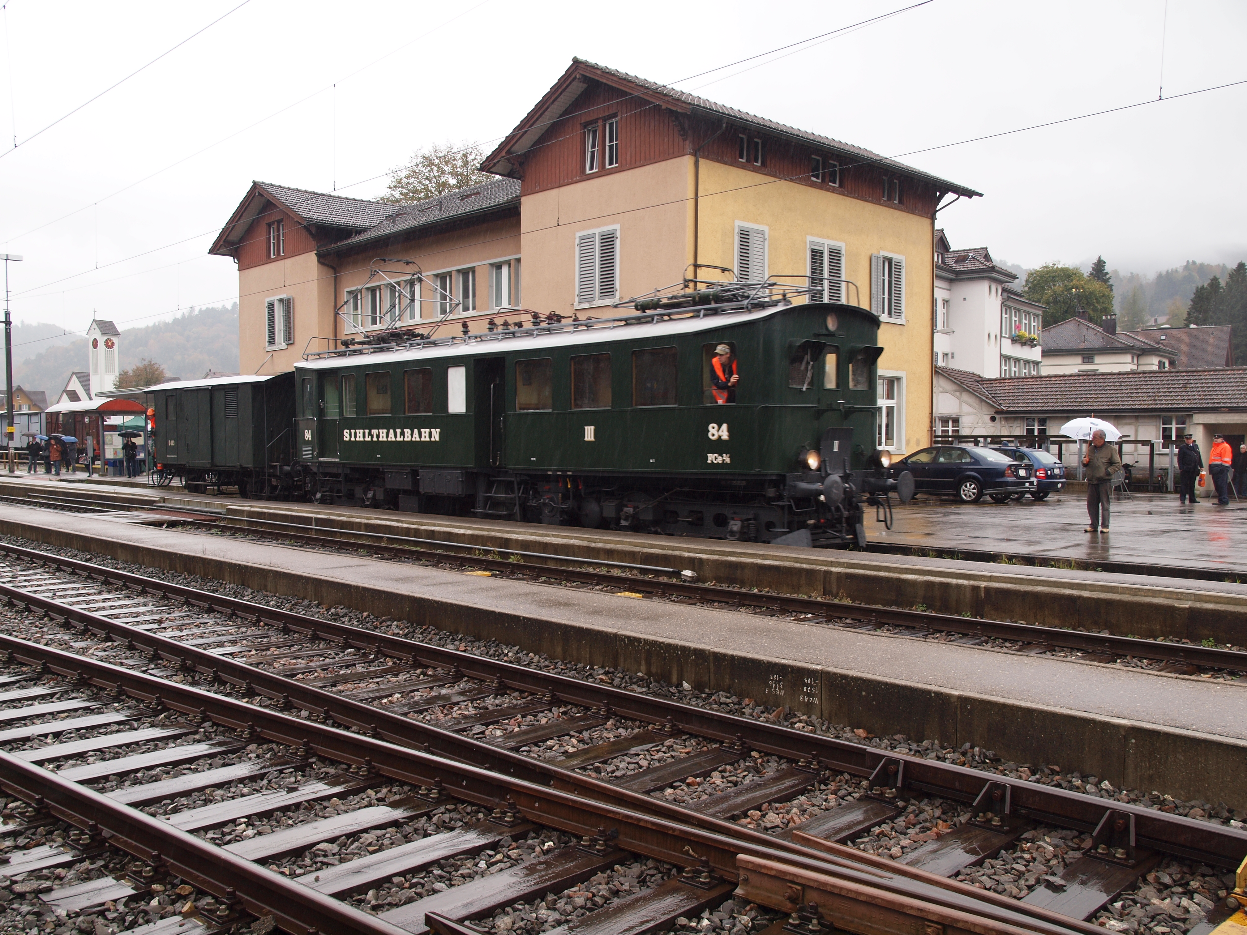 Der historische Triebwagen CFe 2/4 Nr 84 der Sihltalbahn (Die Anschrift ist/war original falsch als FCe 2/4) im Bahnhof Bauma.